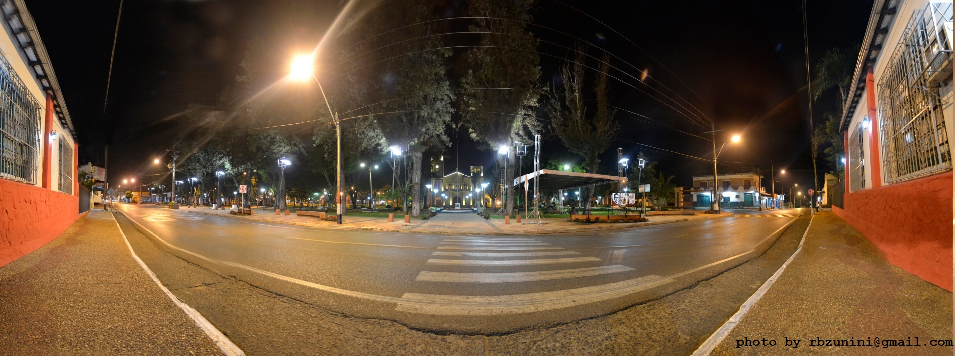 42 photos